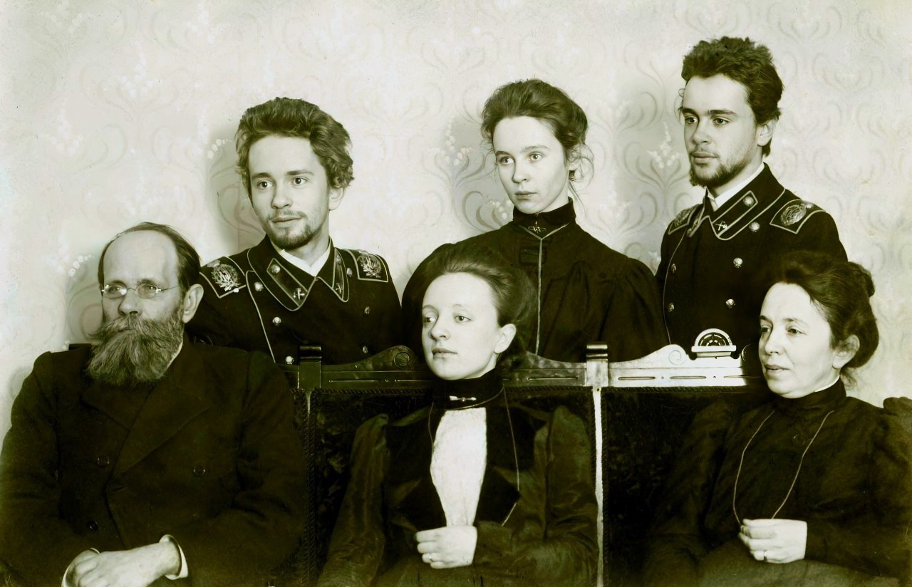 Зотиков Евгений Викторович (1852-1913), Зотикова Татьяна Евгеньевна (1881-1956), Зотикова Елизавета Аполлоновна (1858-1948), Зотиков Владимир Евгеньевич (1887-1970), Зотикова Екатерина Евгеньевна (1885-1976), Зотиков Виктор Евгеньевич (1888-1969).